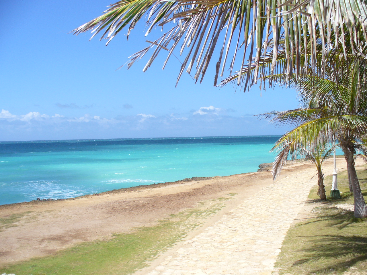 Varadero - 2